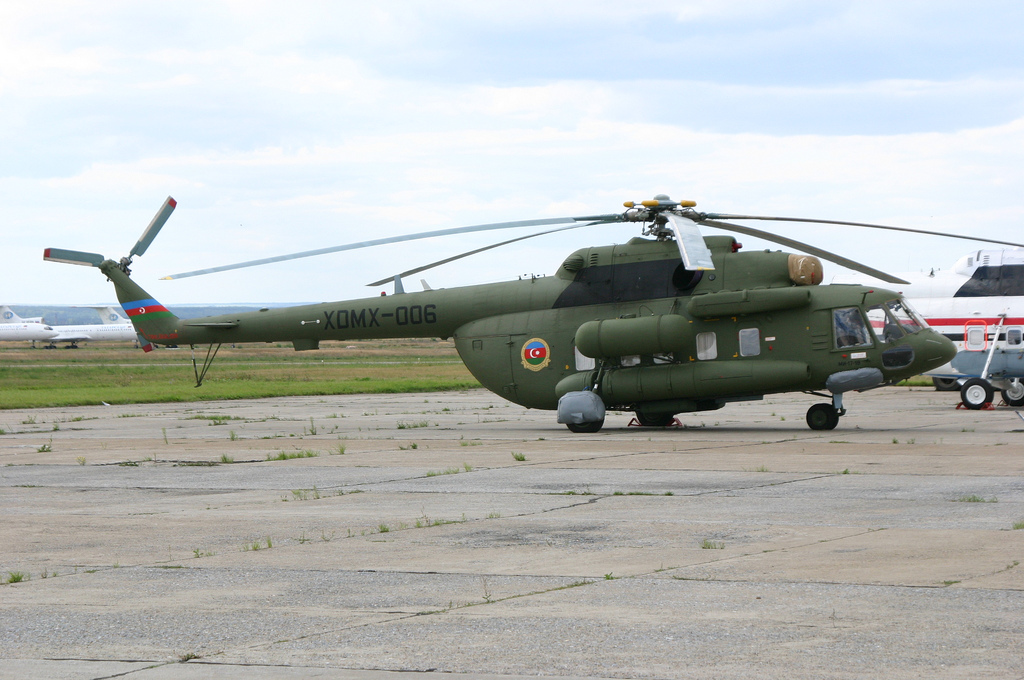 Azərbaycan Respublikasının Xüsusi Dövlət Mühafizə Xidməti